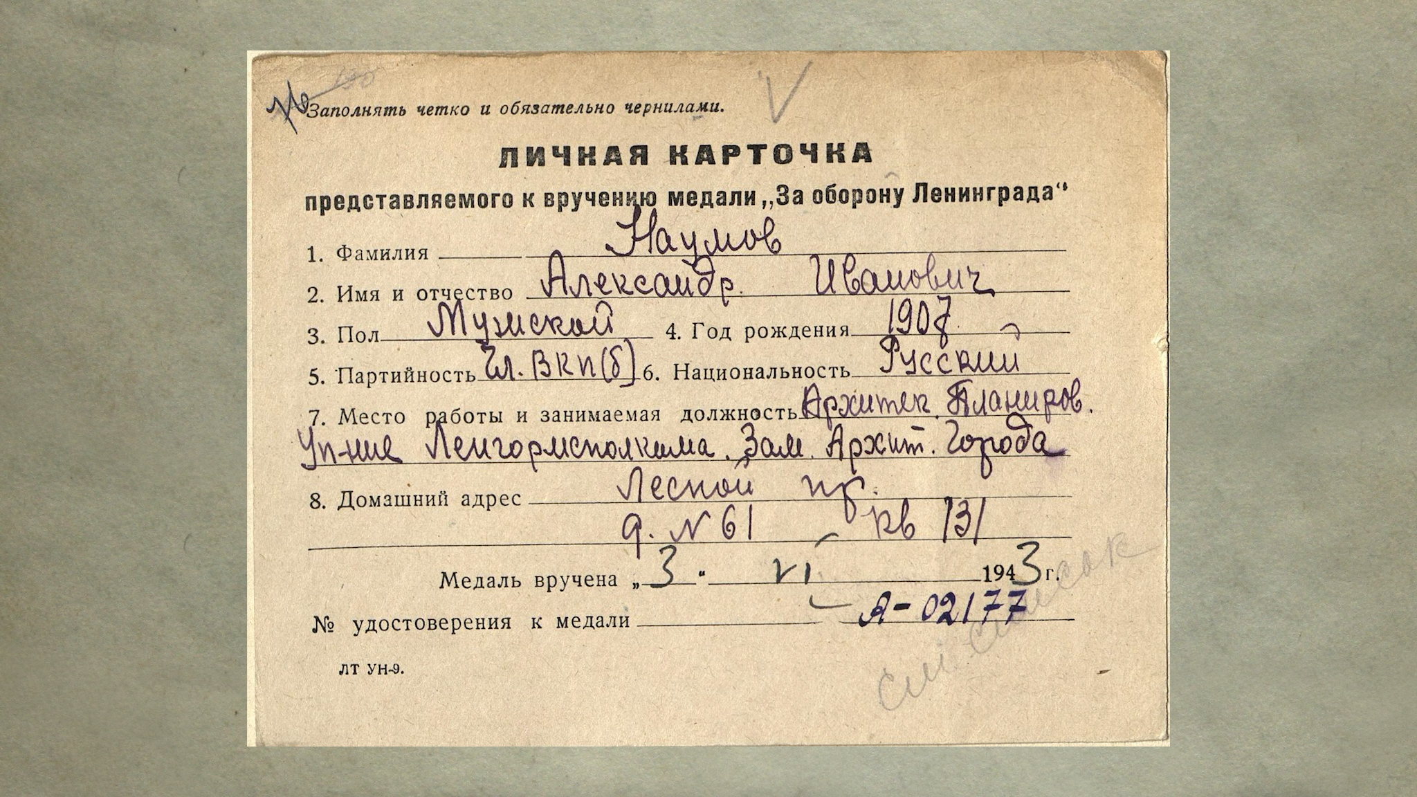 Наградная карточка заместителя главного архитектор Ленинграда А. И. Наумова: 3 июня 1943 года он был награжден «Медалью за оборону Ленинграда». Оригинал документа хранится в Центральном государственном архиве Санкт-Петербурга. Фото сделано на съемках документального фильма «Архитектура блокады», 2019 год.